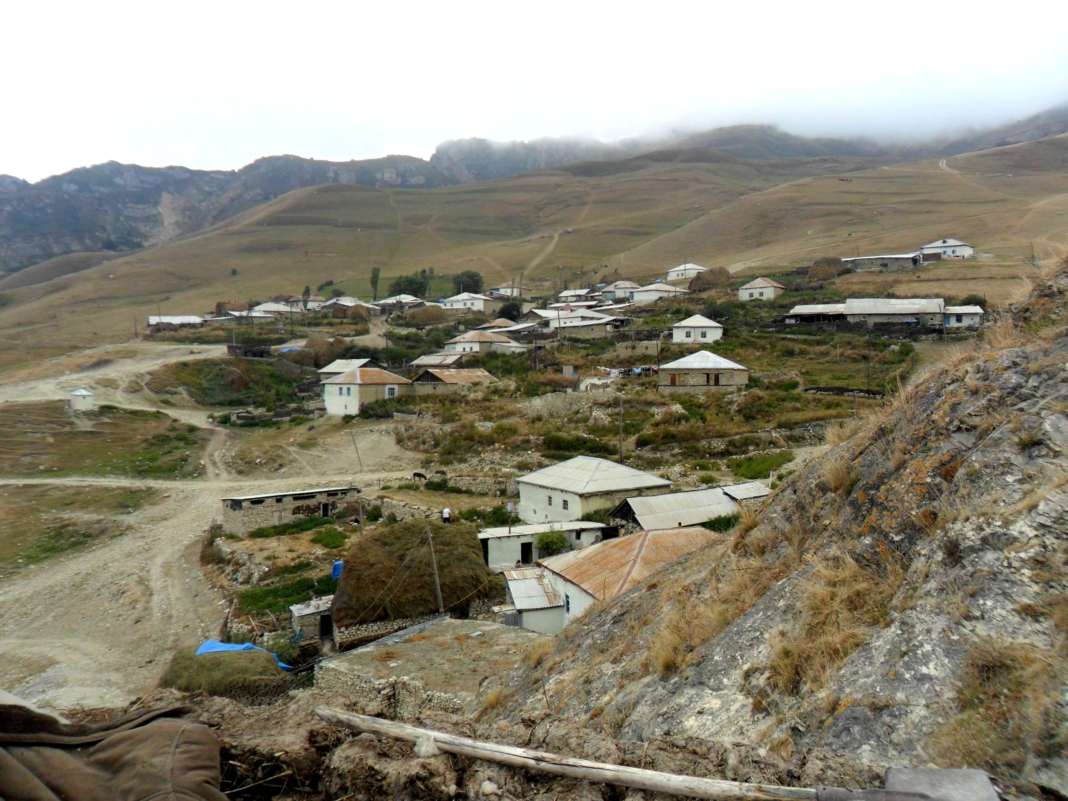 Cek kəndi, Quba, Azərbaycan